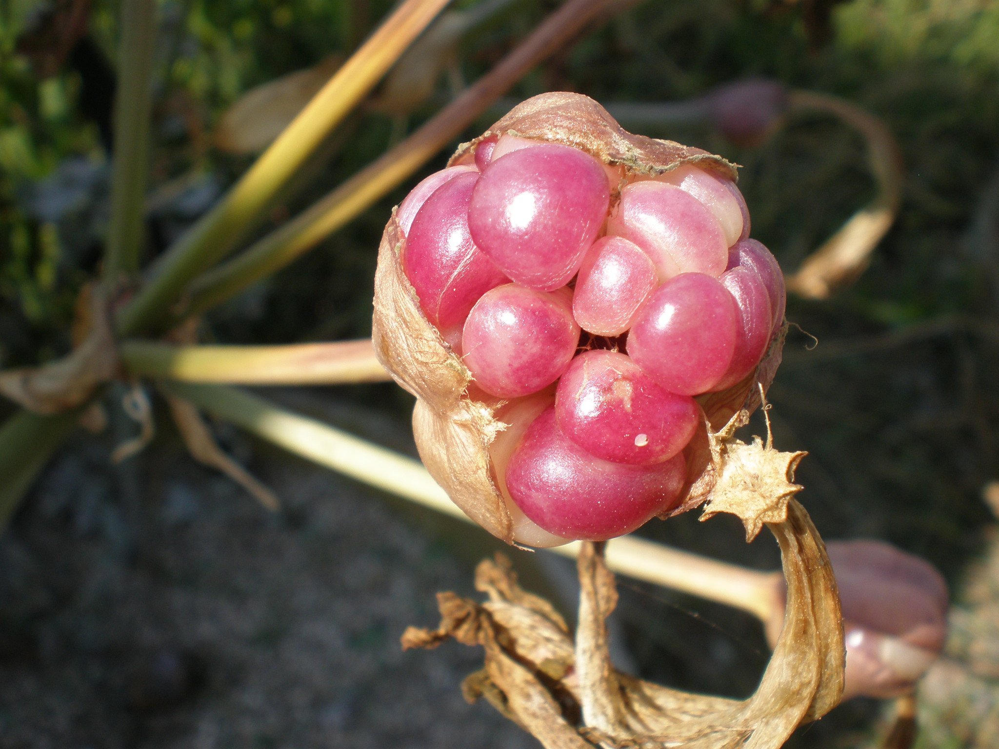 Jardín Botánico de Barcelona.